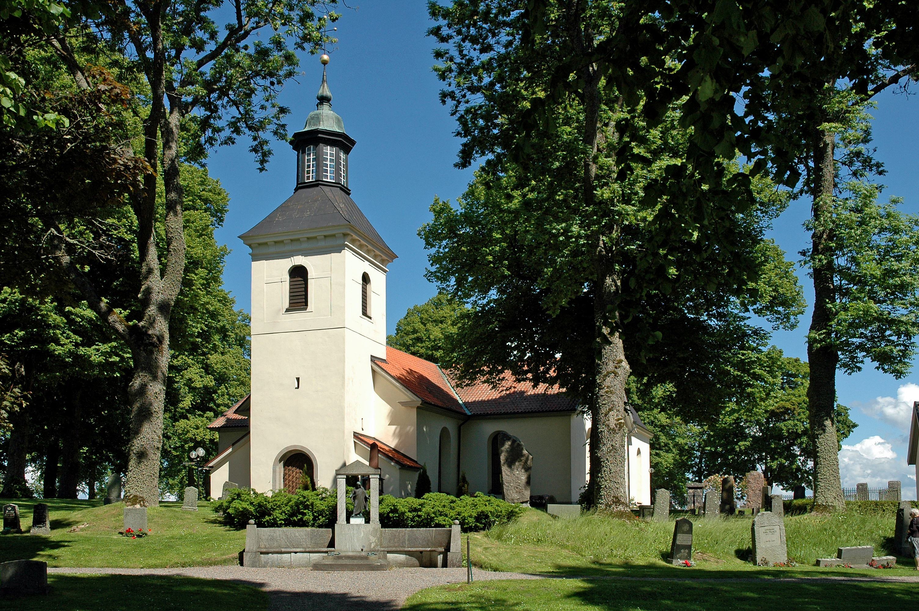 Julita kyrka